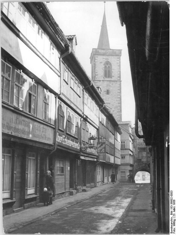 Erfurt, Krämerbrücke, Ägidienkirche Zentralbild Erfurt-Wittig 23.3.1956 Bn-Th. UBz: Krämerbrücke mit Ägidien-Kirche.